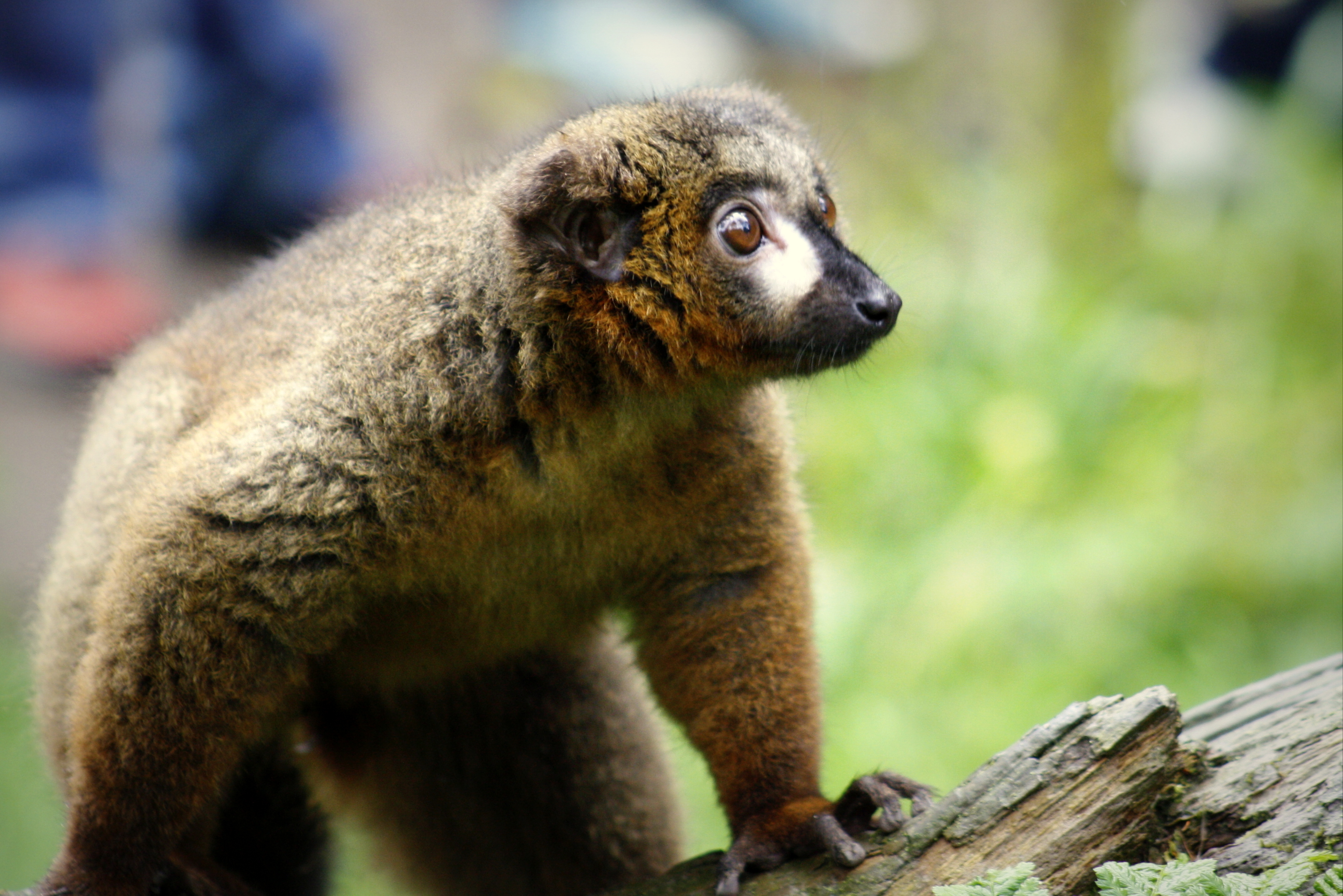 roodbuikmaki, foto genomen in Apenheul, Apeldoorn, Nederland